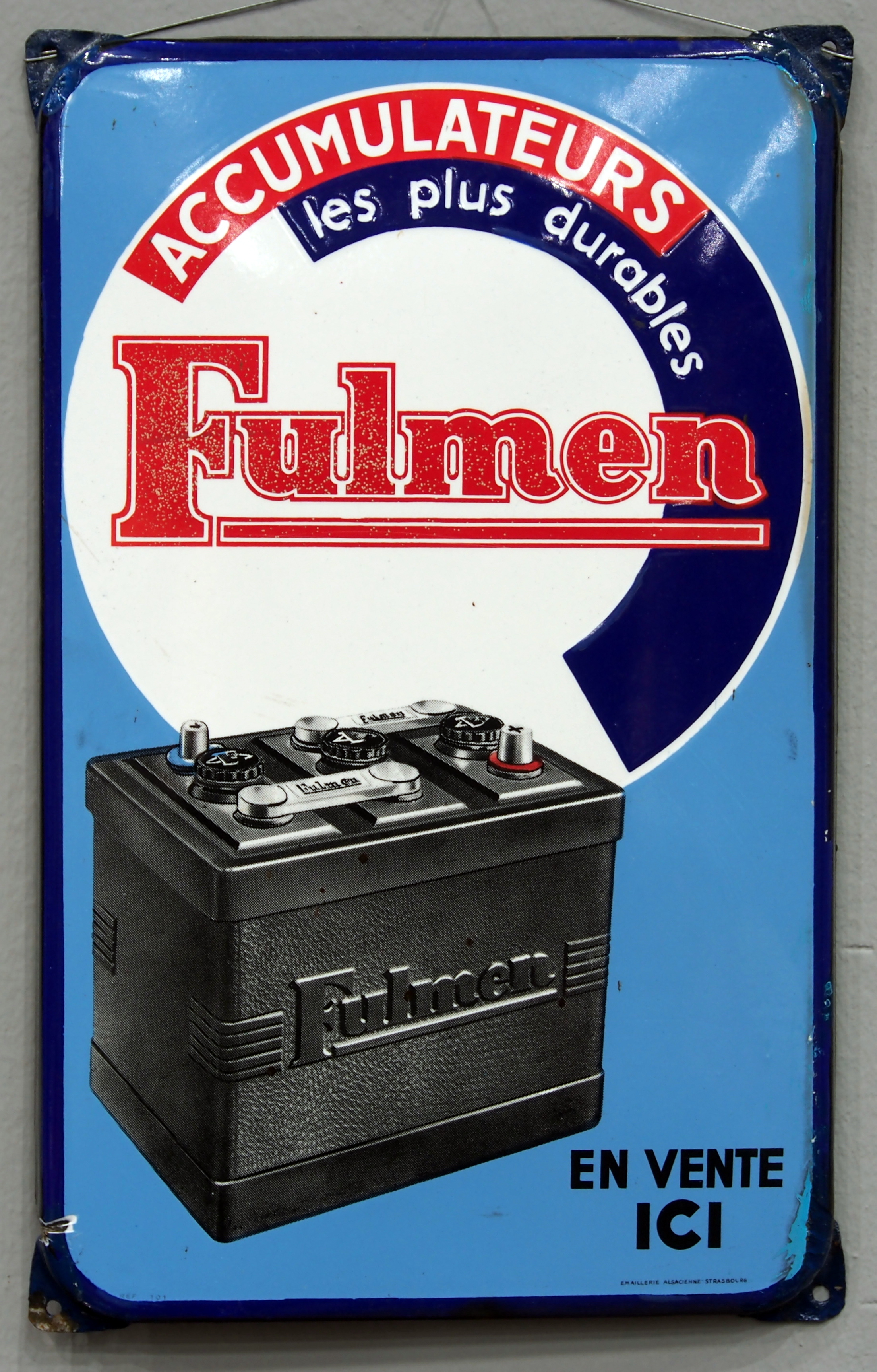 Fulmen accumulateurs emaille reklamebord.